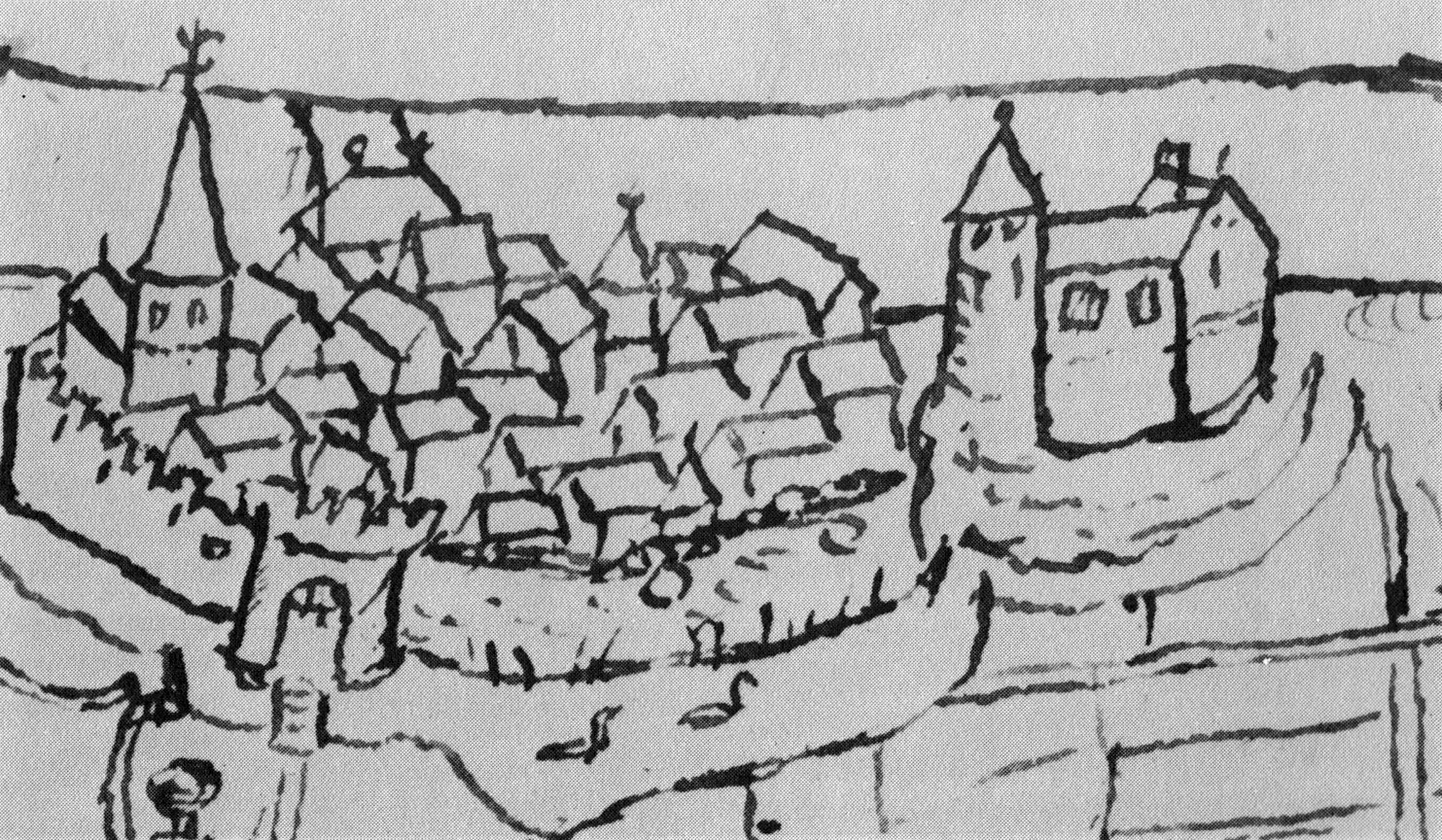 Darstellung der Burg Wachtendonk auf einer Zeichnung aus dem Jahr 1551